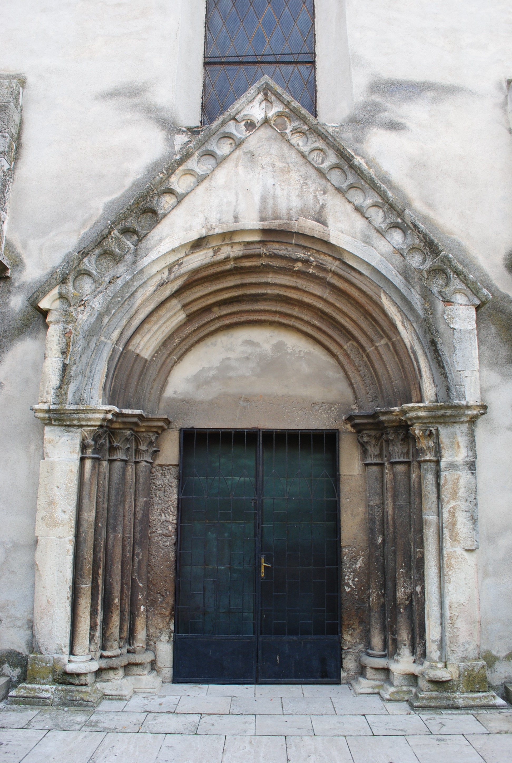 Ansamblul bisericii evanghelice, sec. XIII - XVI